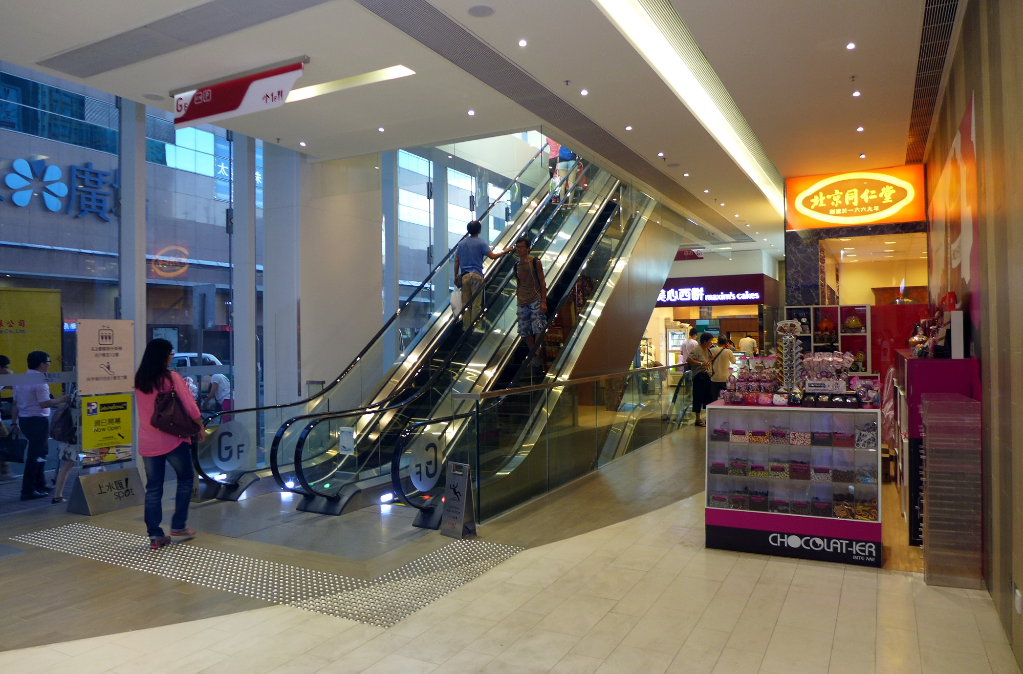 Sheung Shui Spot GF